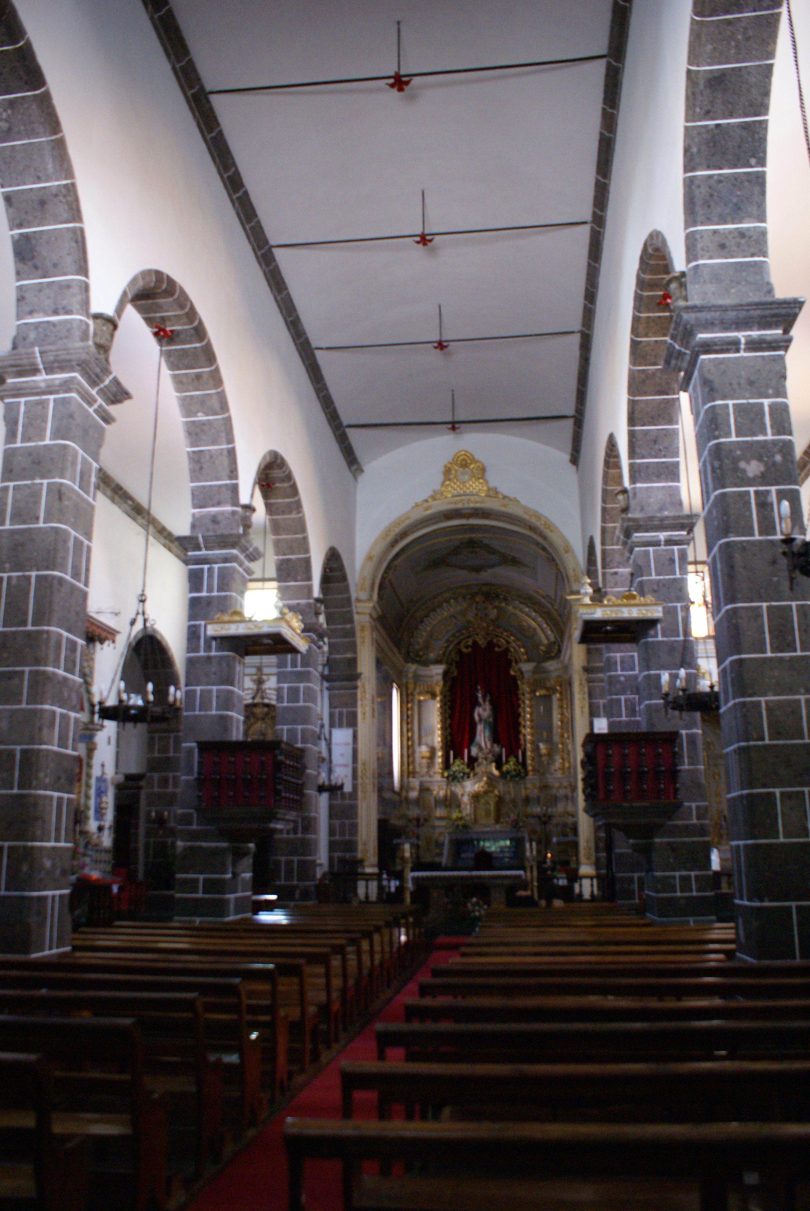 Central nave of Nossa Senhora do Rosário, Lagoa, São Miguel (Azores), Portugal